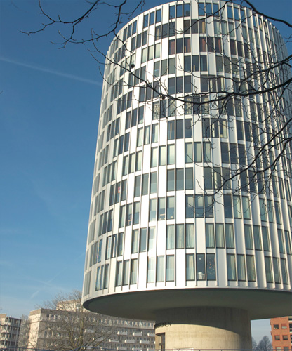 Zelfgemaakte foto van Schutterstoren in Osdorp; Meer en Oever